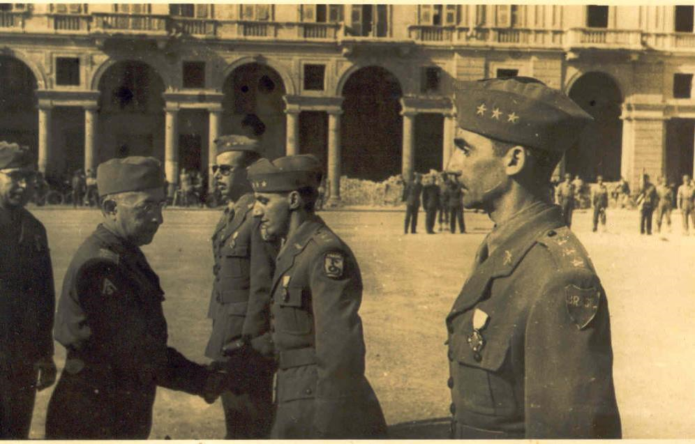 Cap Theophilo sendo condecorado, na Itália, junto aos demais Comandantes de OM Expedicionárias